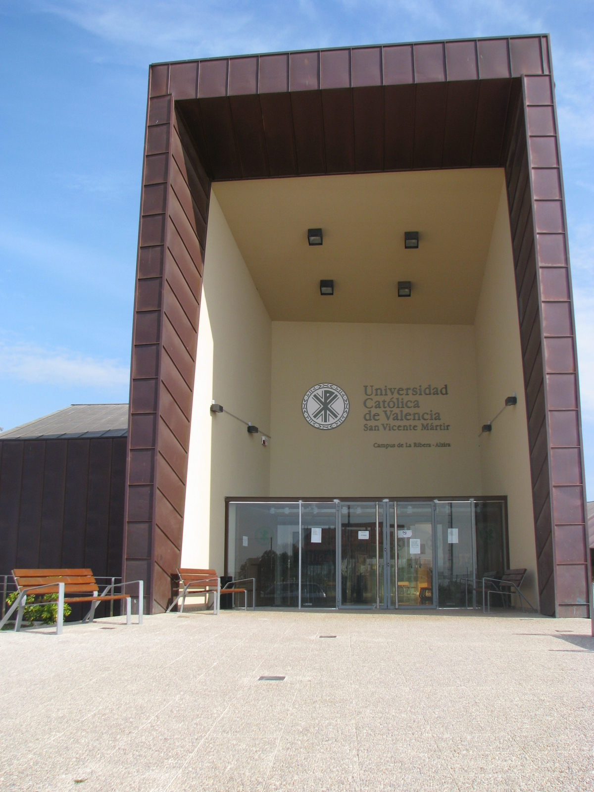 Fachada de la Universidad Católica de Valencia San Vicente Mártir (Alzira)